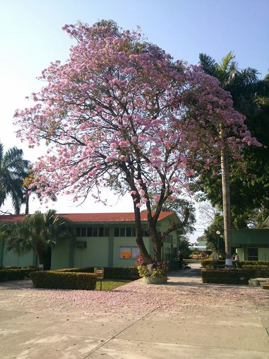 El macuilís, un árbol típico de Tabasco que florece sólo una vez al año durante 2 o 3 semanas comprendidas entre los meses marzo-abril.